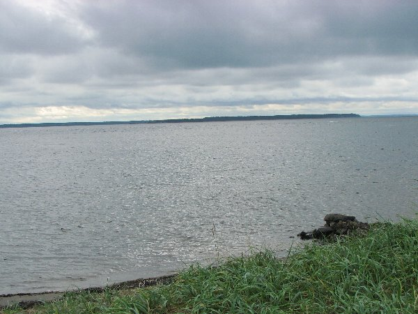 風蓮湖(2007年9月 投稿者撮影)